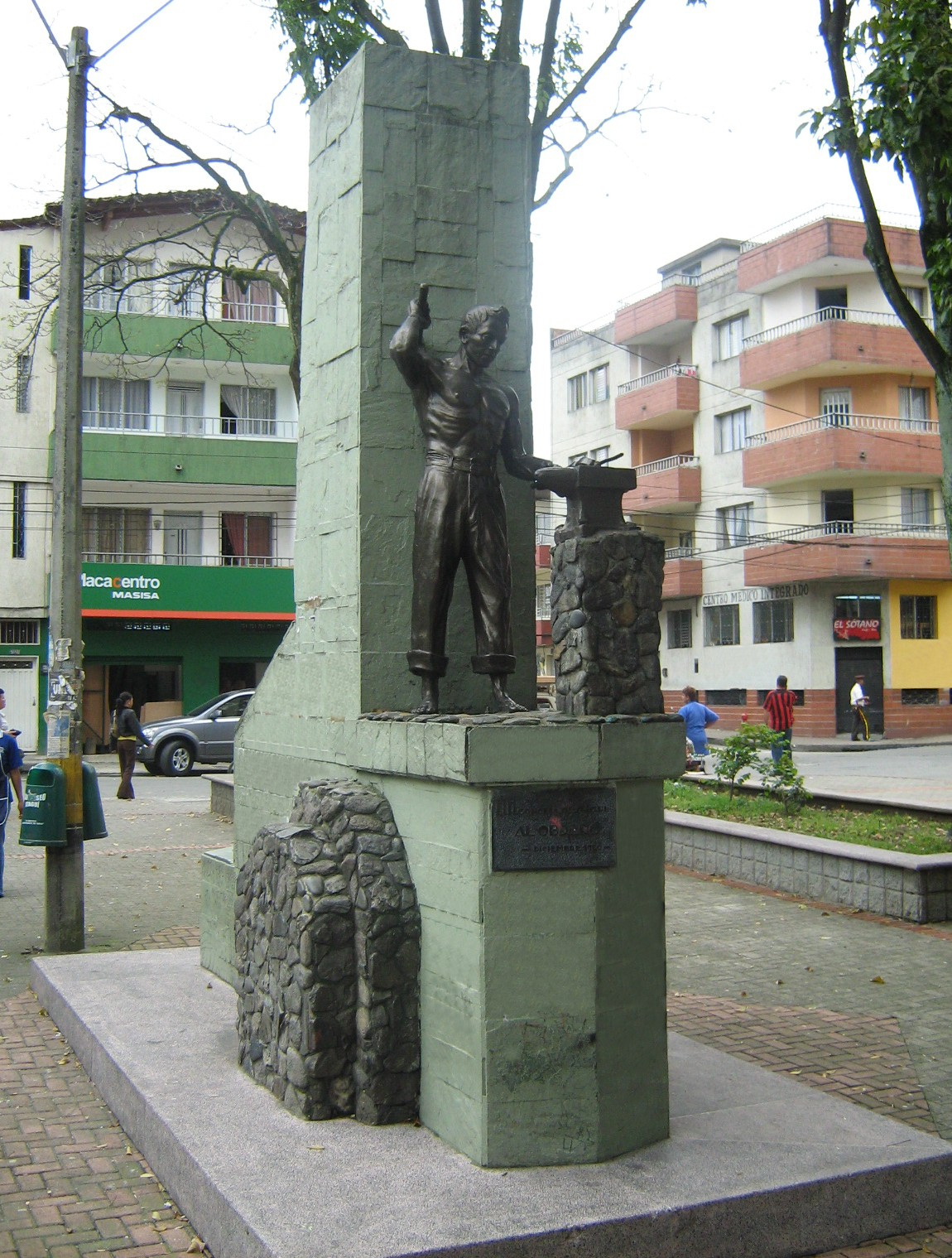 Escultura "El Obrero" del maestro Octavio Montoya, localizada en el parque Obrero en el municipio de Itagüí. Colombia.